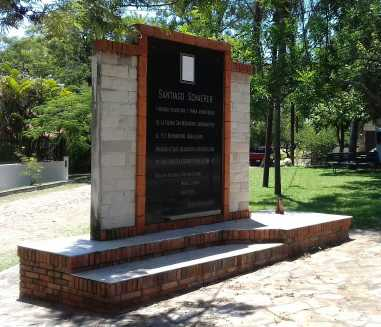 Monumento en San Bernardino, dedicado al ciudadano suizo Santiago Otto Schaerer, quien fuera el primer administrador de la colonia.